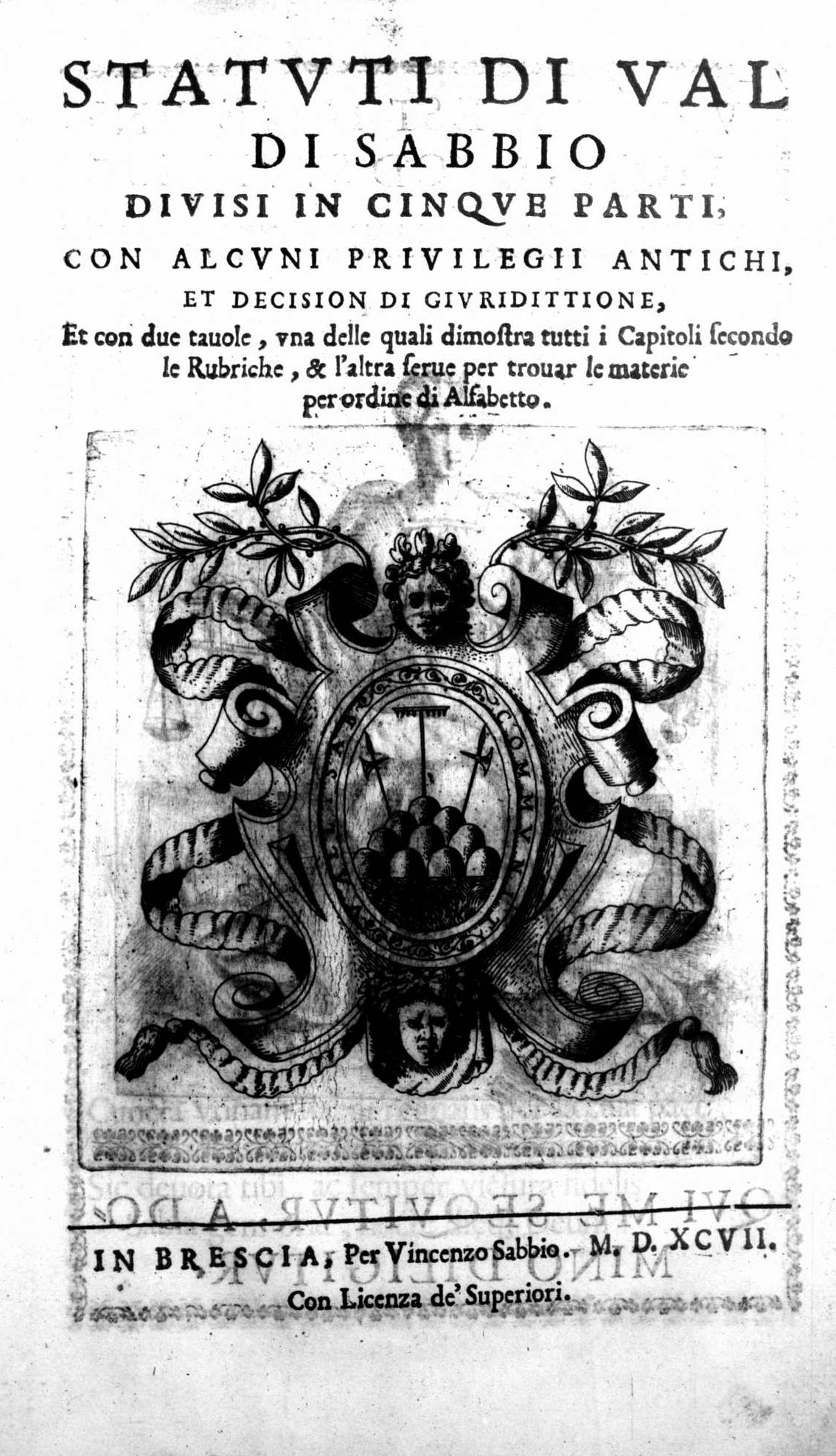 Frontespizio